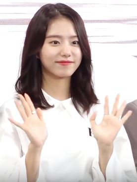 영화 '윤희에게' 야외 무대인사가 5일 오후 부산 해운대구 영화의전당 야외무대에서 열렸다.